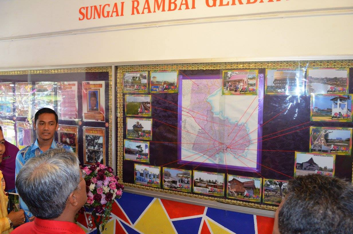 peta lokasi